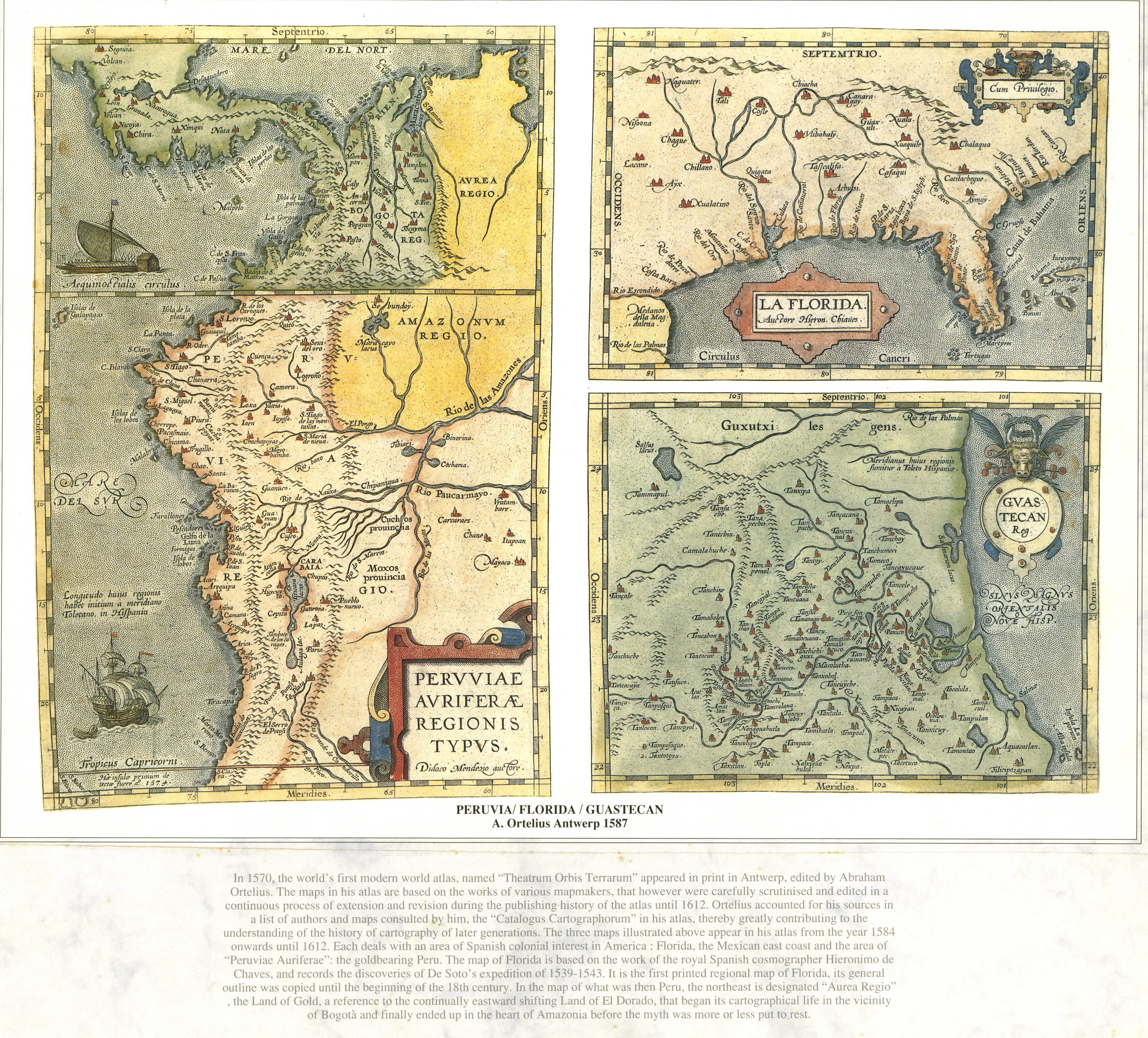 Diapositiva de Consulta y acceso público cuya información fue investigada de un libro y/o ejemplar de revisión custodiado en los Fondos Bibliográficos y Cartrográfico (Sección Siglo XVI o Etapa Colonial) del Archivo Histórico del Guayas; Guayaquil, Ecuador.